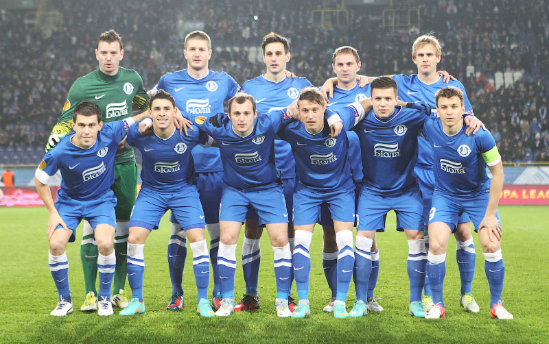 Дніпро Днепропетровськ перед матчем з АІКом